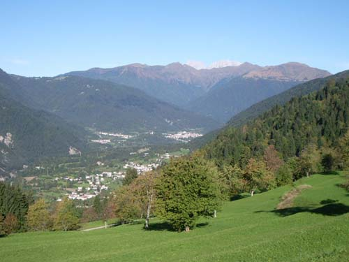 Panorama di Arta Terme (Udine)